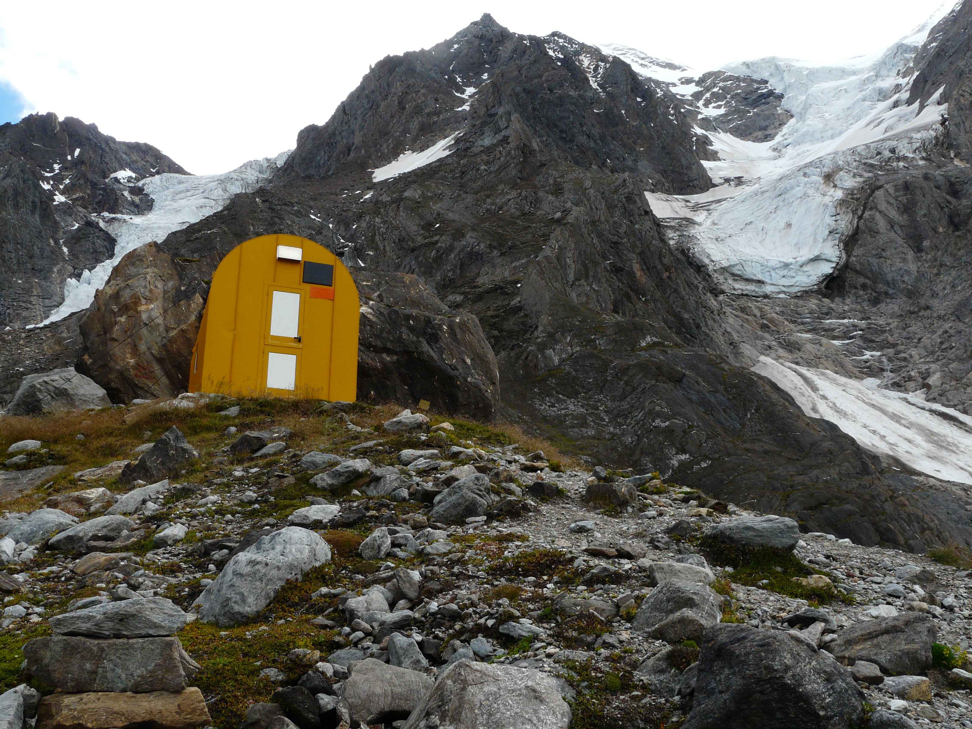 Günther-Messner-Biwak unterhalb der Hochfernerspitze mit Griesferner (links) und Hochferner